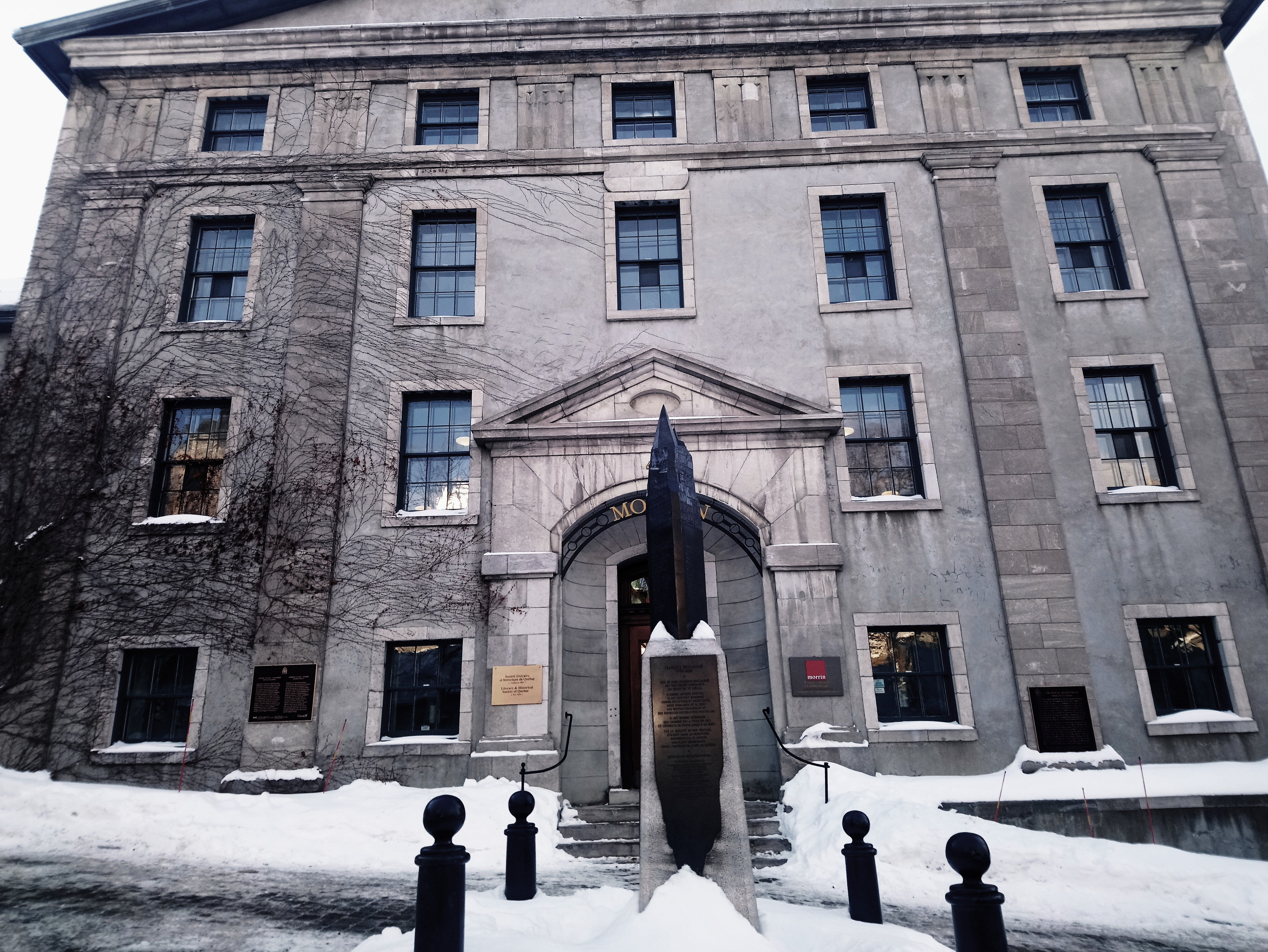 Façade du Morrin Centre, siège de la LHSQ